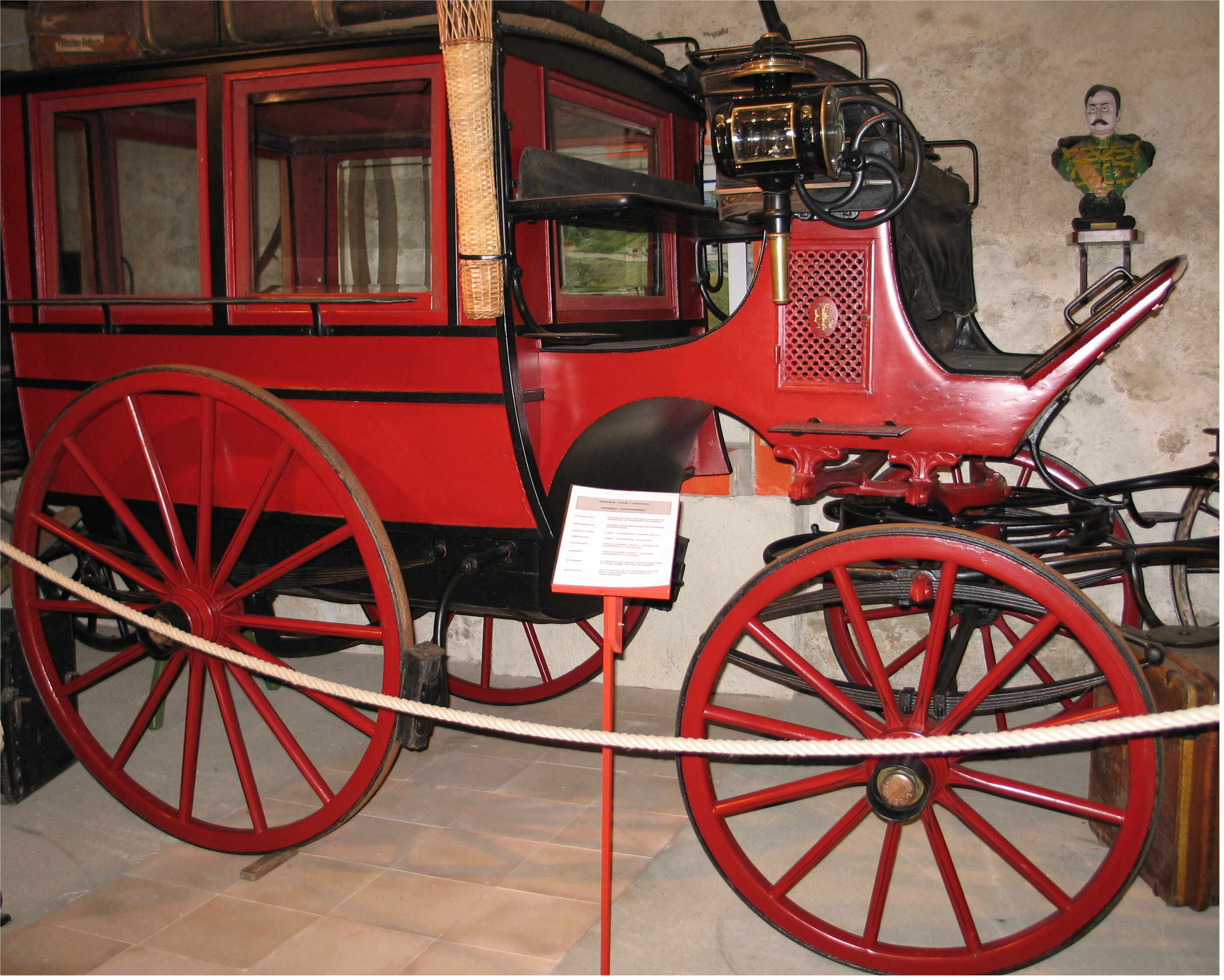 Eng Kutsch am Kutschemusée zu Peppeng. Kategorie:Gemeng Réiser Peppeng